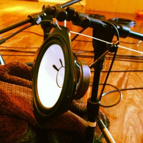 Transductor hecho en casa